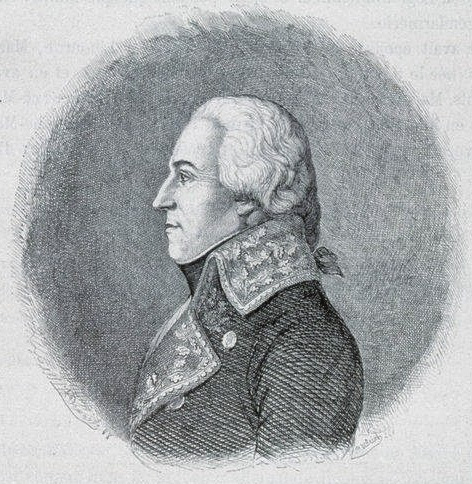 Jacques-Maurice Hatry, général de division, sénateur, d'après un portrait appartenant à sa famille, Buste, profil à g. Bibliothèque nationale et universitaire de Strasbourg